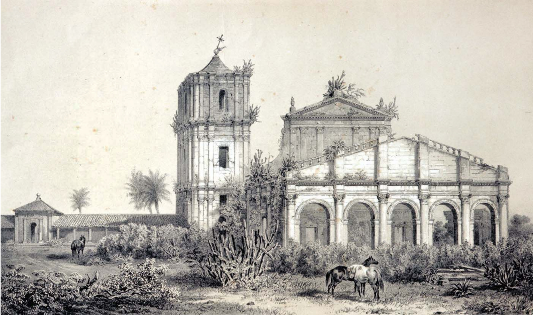 Redução de São Miguel Arcanjo em 1846